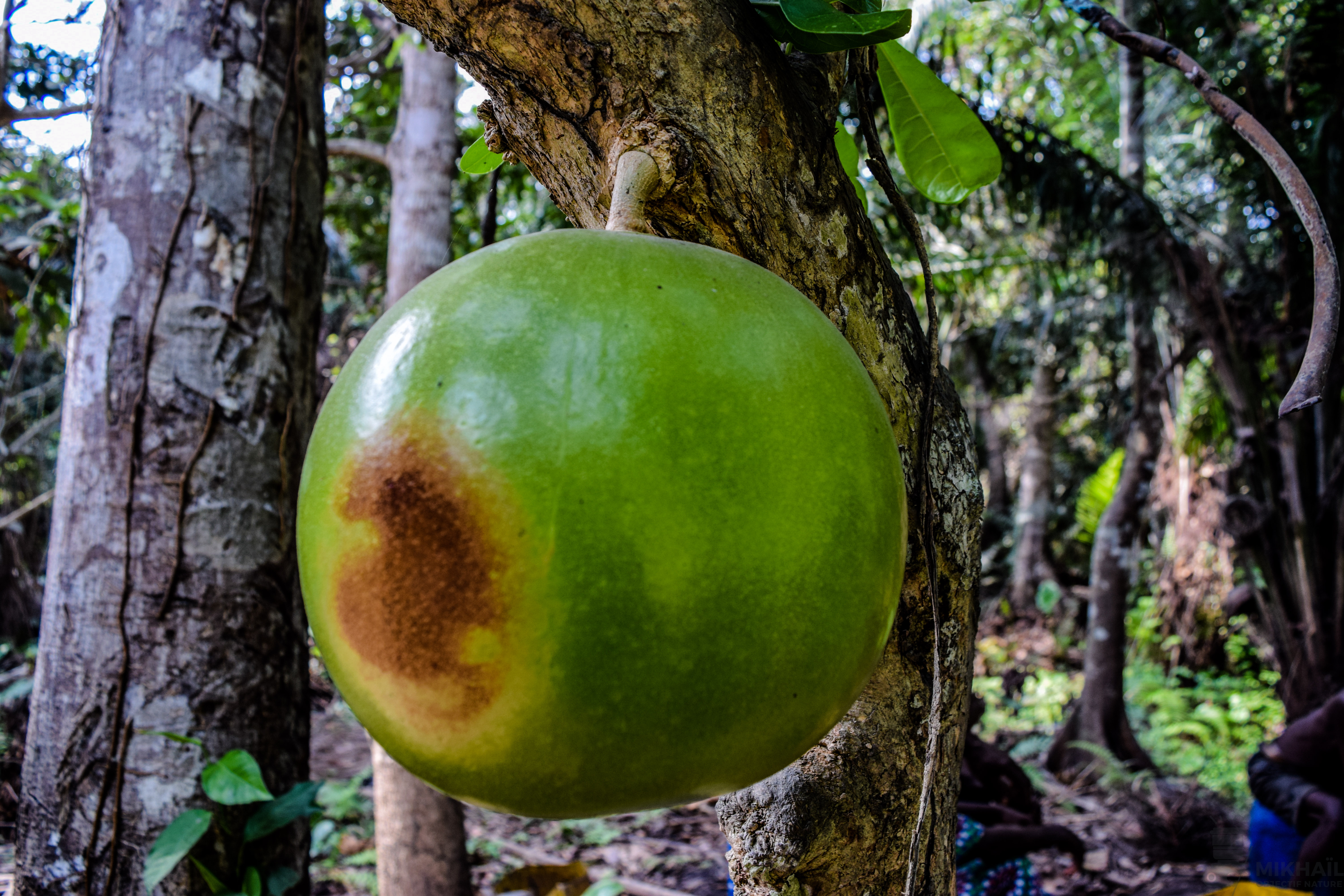 Arbre à gourde dans la forêt de Lokoli